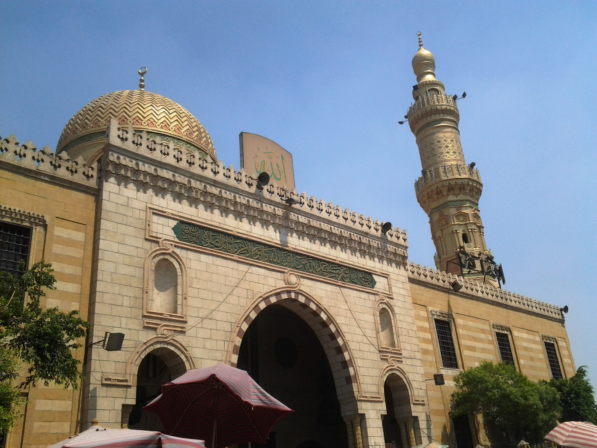 مسجد السيدة نفيسة بالقاهرة.